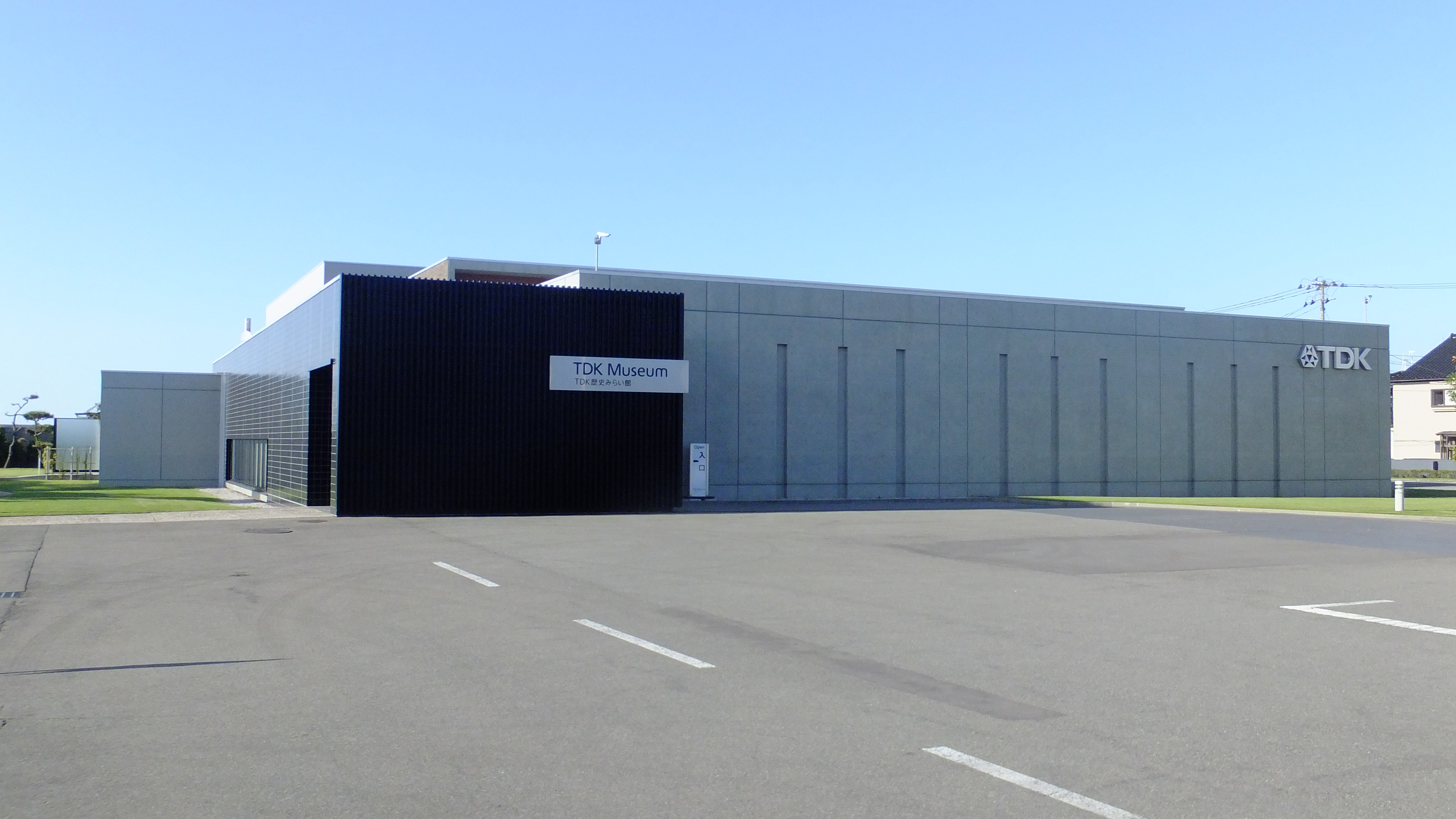 TDK歴史みらい館（秋田県にかほ市）